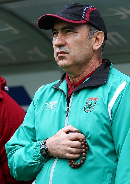 Курбан Бердыев на матче ЦСКА - Рубин 17 апреля 2011